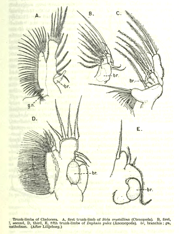 Cladocera trunk limbs Sida crystallina Daphnia pulex